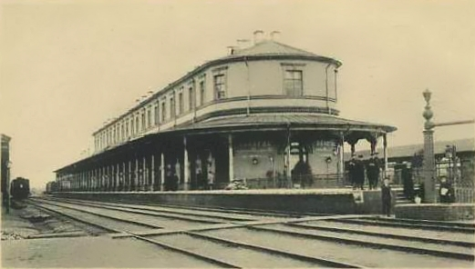 станция Бологое (с московской стороны) на почтовой карточке)